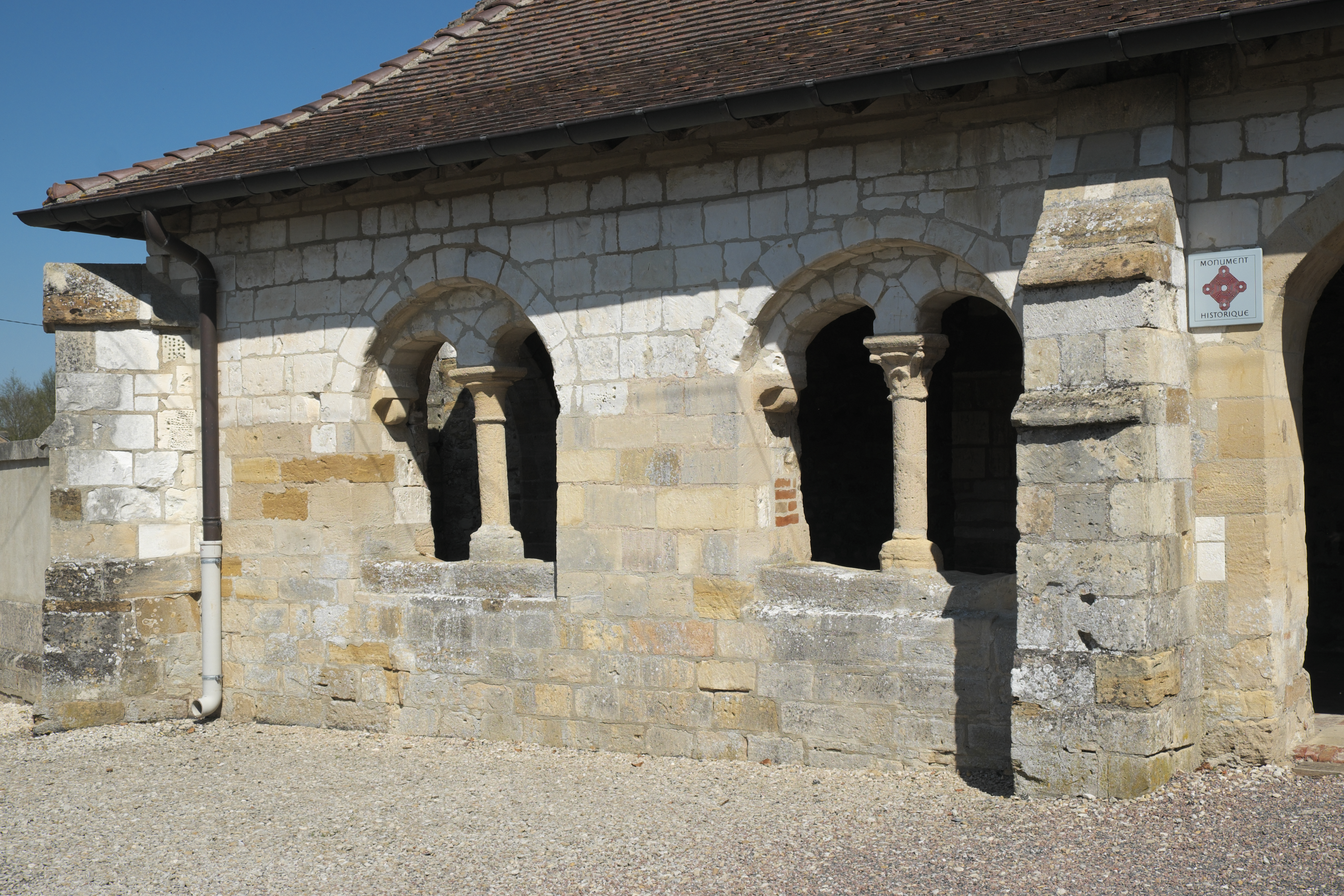 Katholische Kirche Saint-Symphorien in Ponthion im Département Marne in der Region Grand Est/Frankreich, Vorhalle